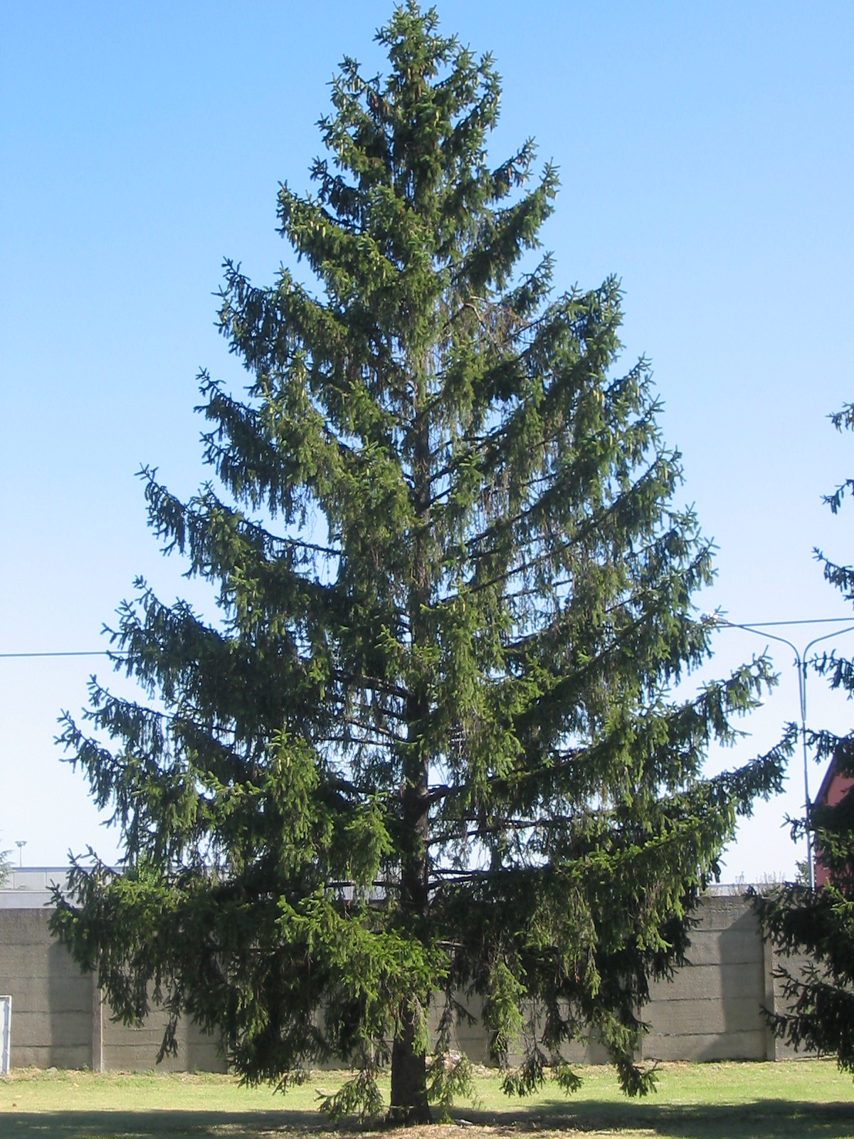 Portamento (1) (c) Utente:Fraxinus